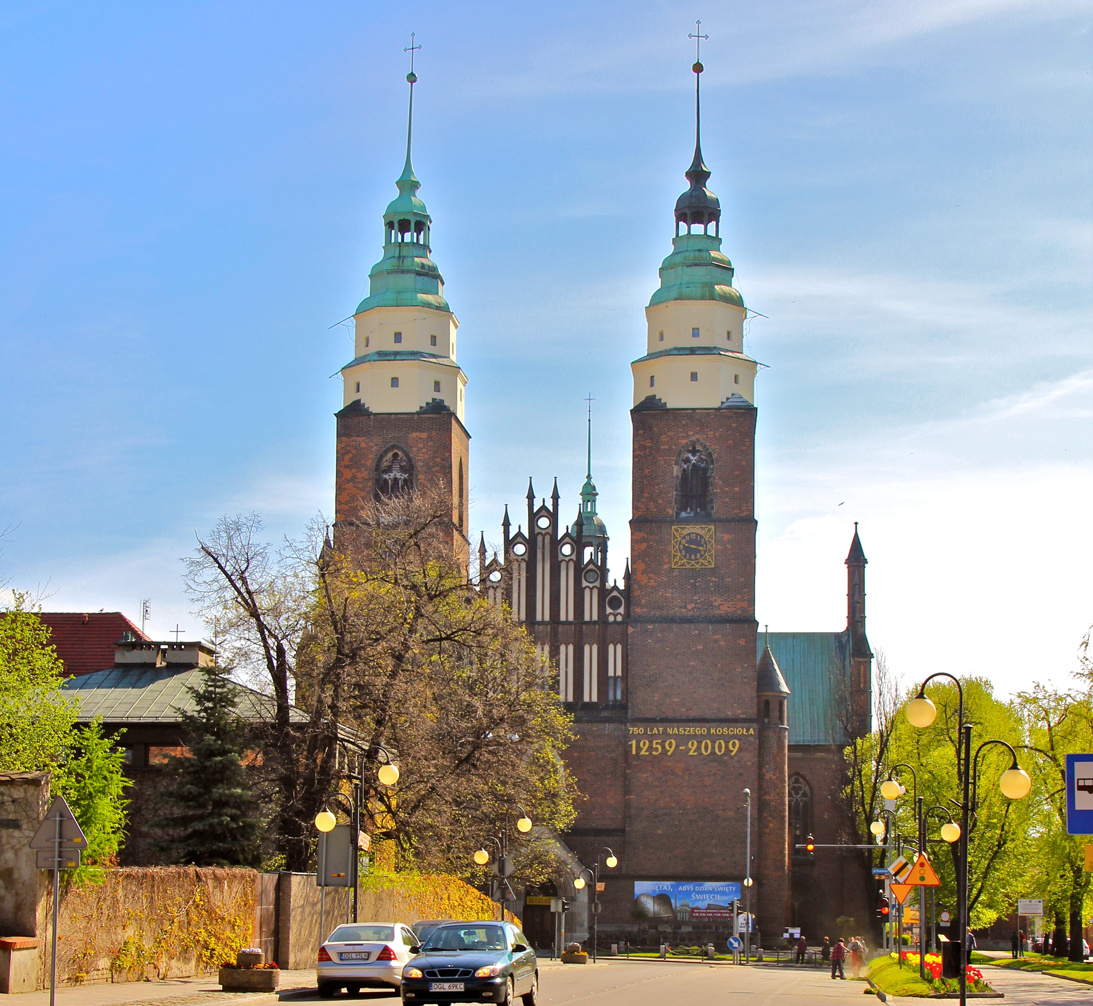 Kościół pw. Narodzenia NMP w Głubczycach - miasto w Polsce położona w województwie opolskim, w powiecie głubczyckim.